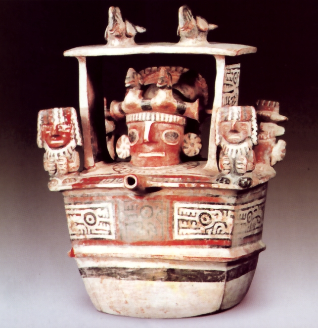 Cerámica de la Cultura Recuay del tipo paccha, con su caño o vertedera.